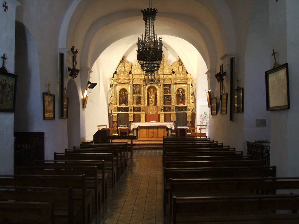 Amélie-les-Bains-Palalda, village médiéval de Palalda (Pyrénées-Orientales, Languedoc-Roussillon, France) : église Saint-Martin-de-Palalda : vue intérieure avec, en fond, le retable du maître-autel (daté de 1656).